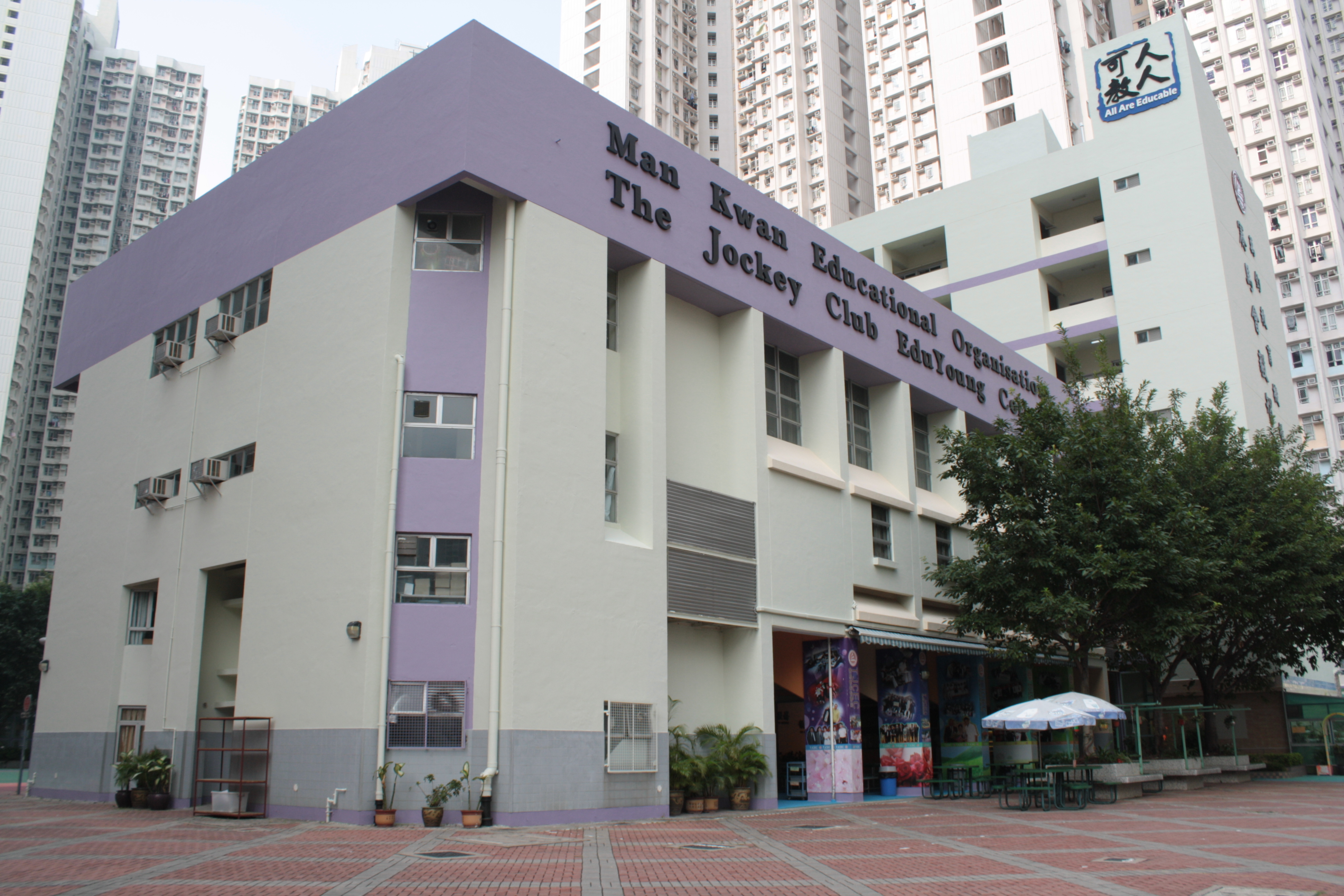 圖中為賽馬會毅智書院校舍